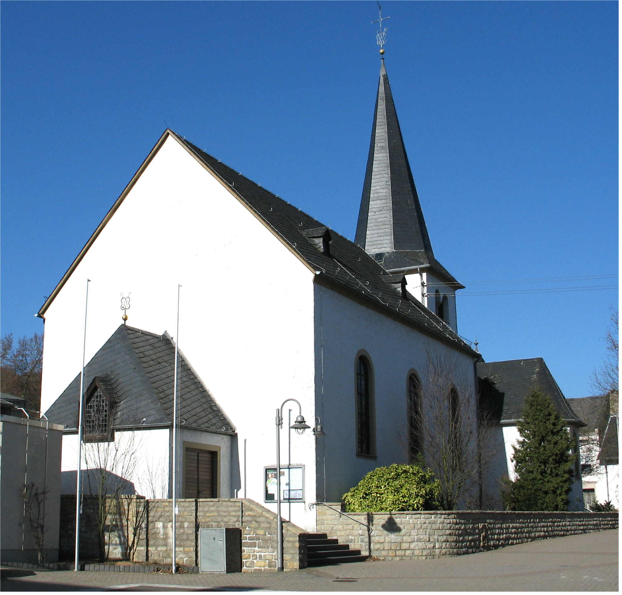 Kierch zu Laser (Mäerz 2006)